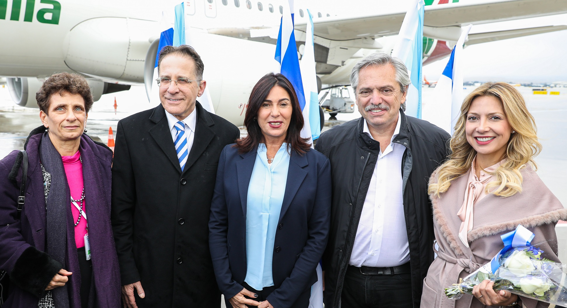 El presidente Alberto Fernández llegó esta mañana a Israel. En el aeropuerto internacional de Tel Aviv, el mandatario fue recibido por la ministra de Cultura y Deporte, Miri Regev; el director general del Ministerio de Relaciones Exteriores, Yuval Rotem; el director general adjunto para América Latina y el Caribe, Modi Ephraim, y la embajadora israelí en Argentina, Galit Ronen.